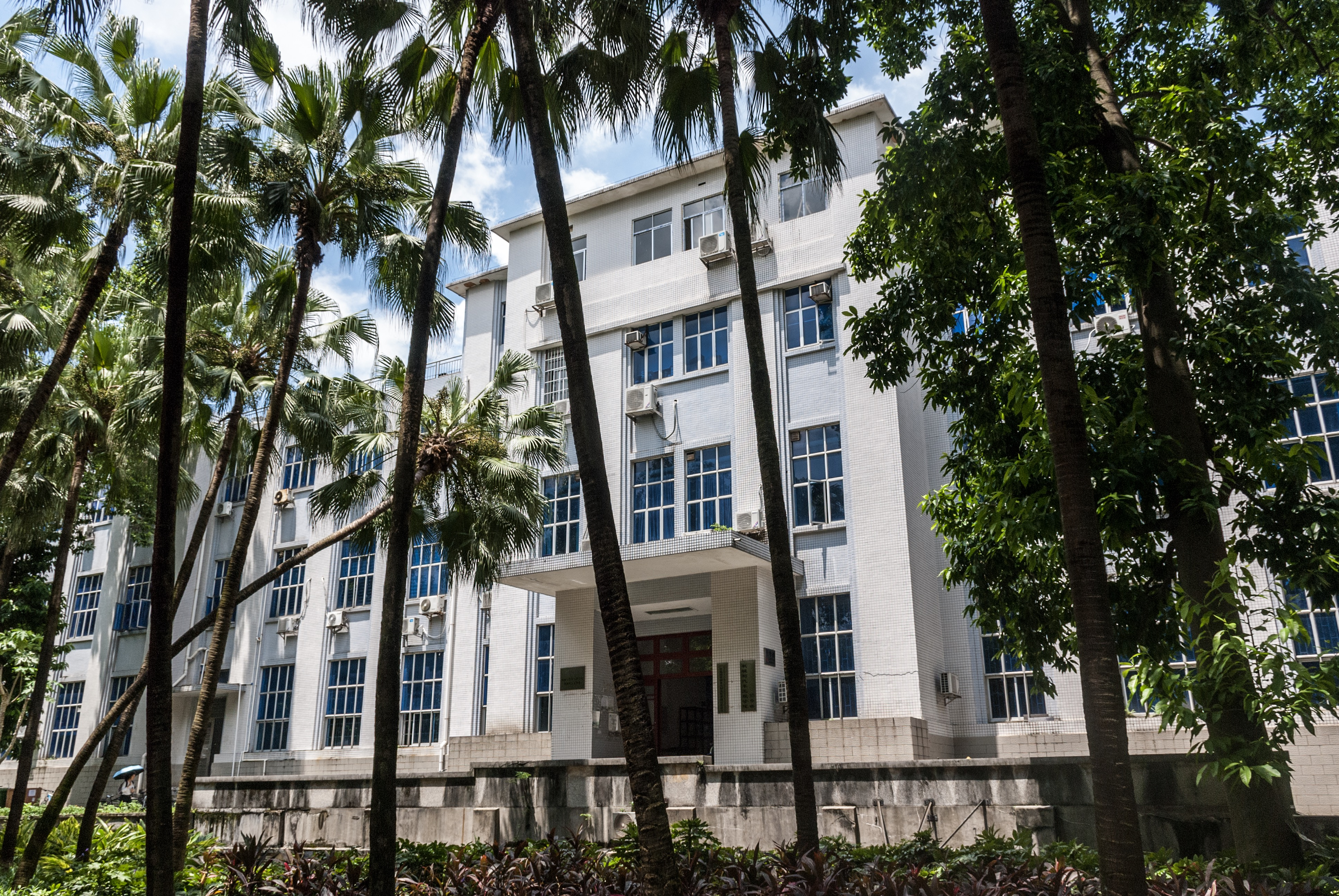 華南理工大學10號樓。原為國立中山大學工學院強電流實驗室，現華南理工大學機械與汽車工程學院。 中文（中国大陆）: 华南理工大学10号楼。原为国立中山大学工学院强电流实验室，现华南理工大学机械与汽车工程学院